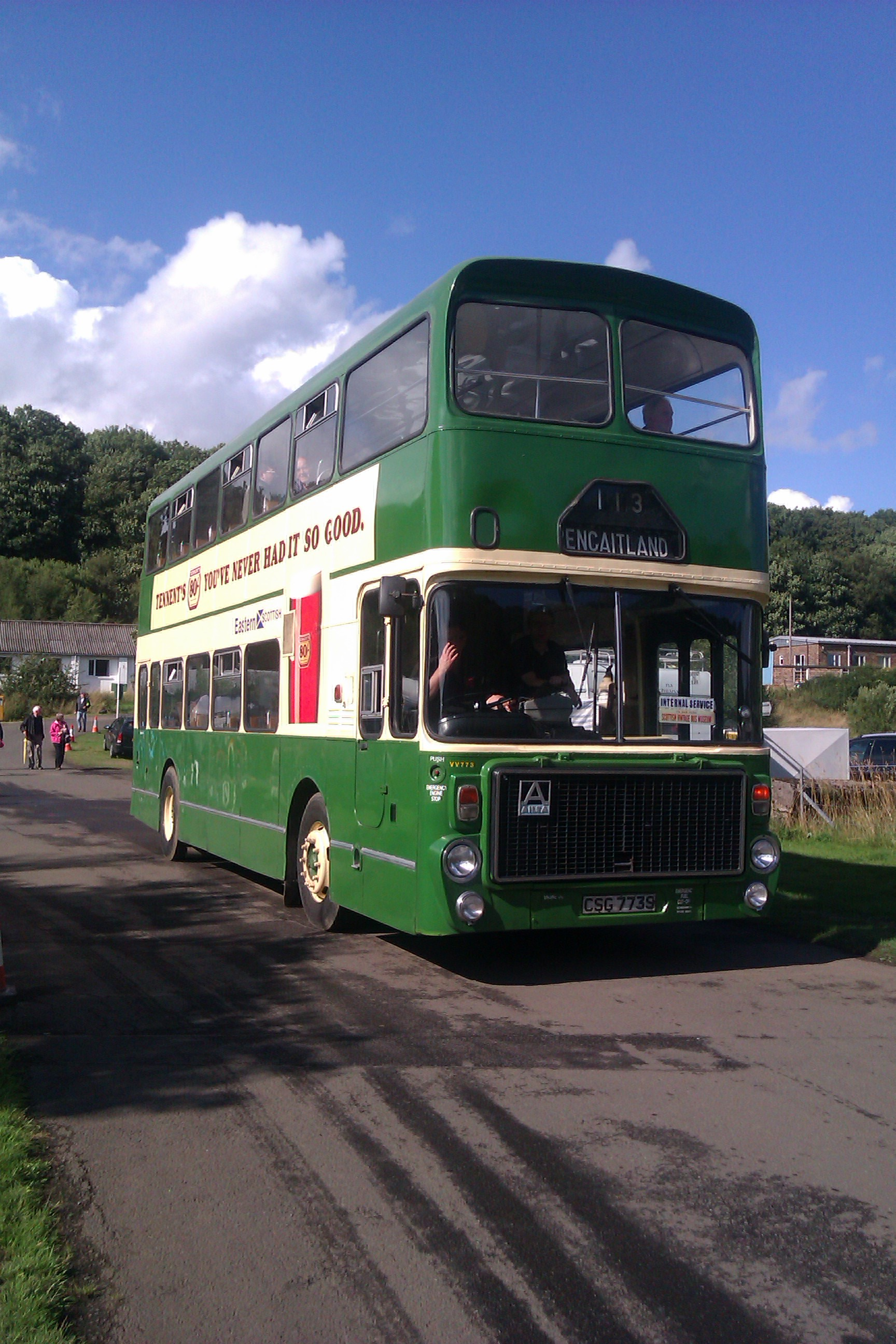 IMAG3032